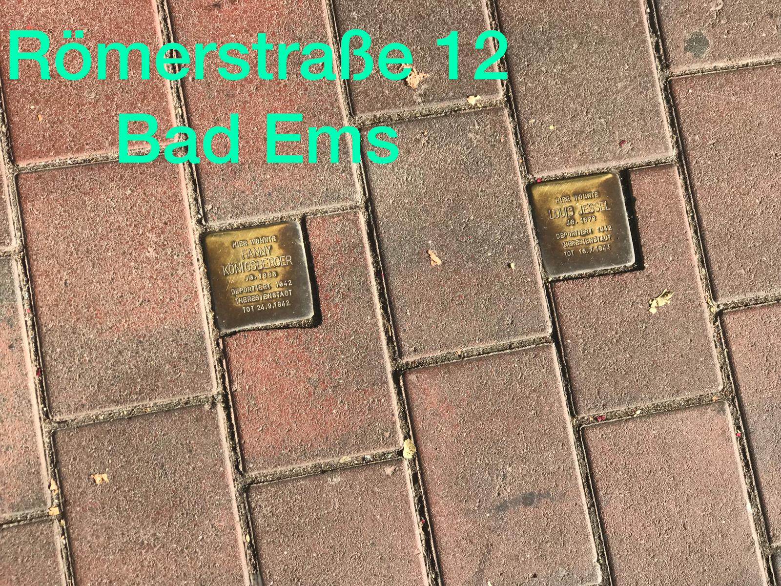 StolpersteinBadEmsRömerstraße12